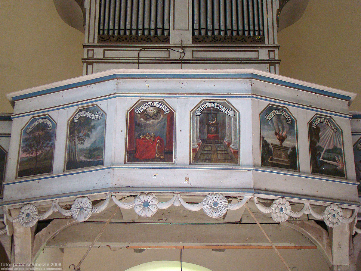 Schlosskirche Ivenack, Orgelempore mit allegorischen Gemälden